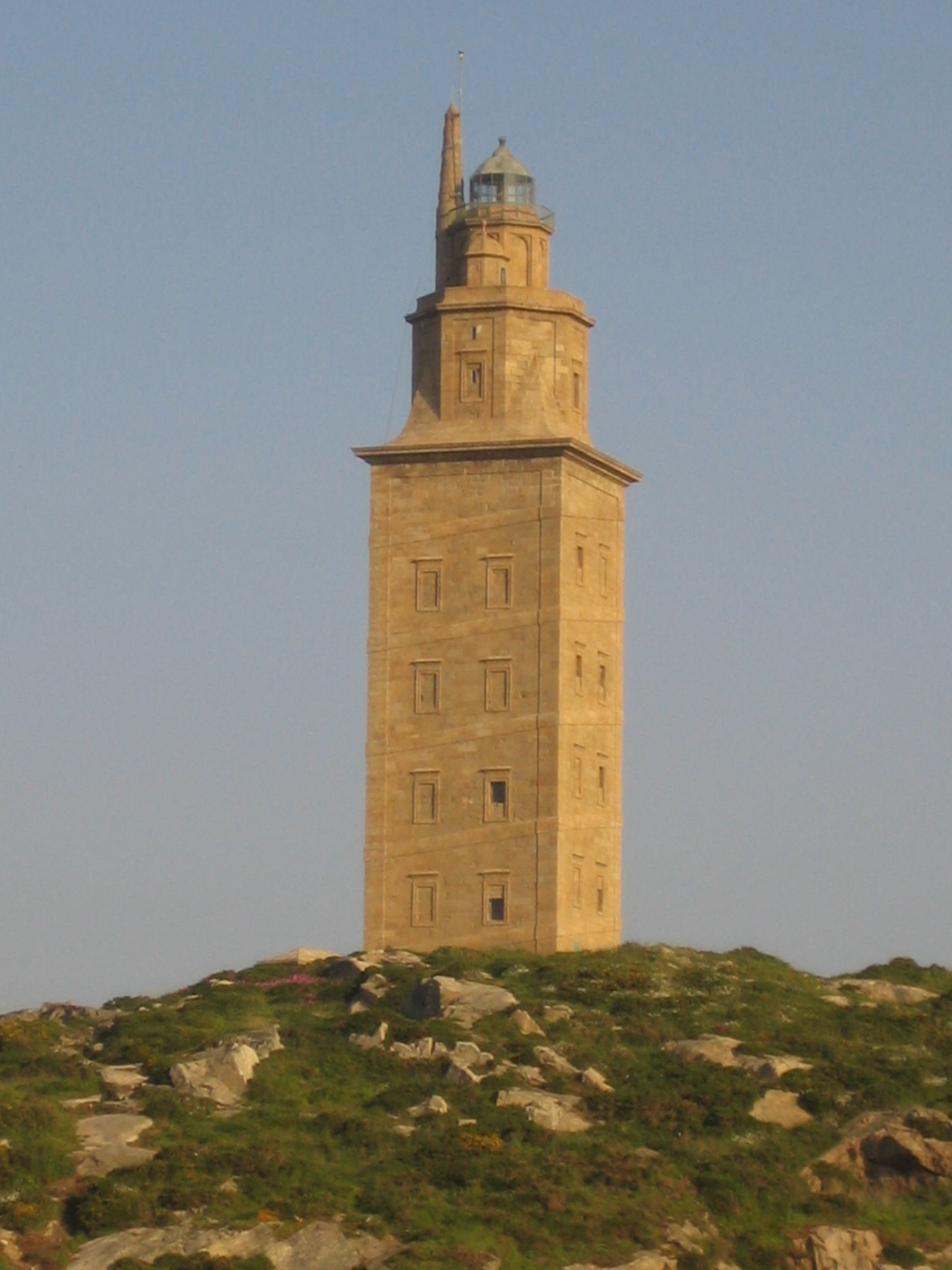 Herkulesturm (Torre de Hércules), La Coruna, Galizien